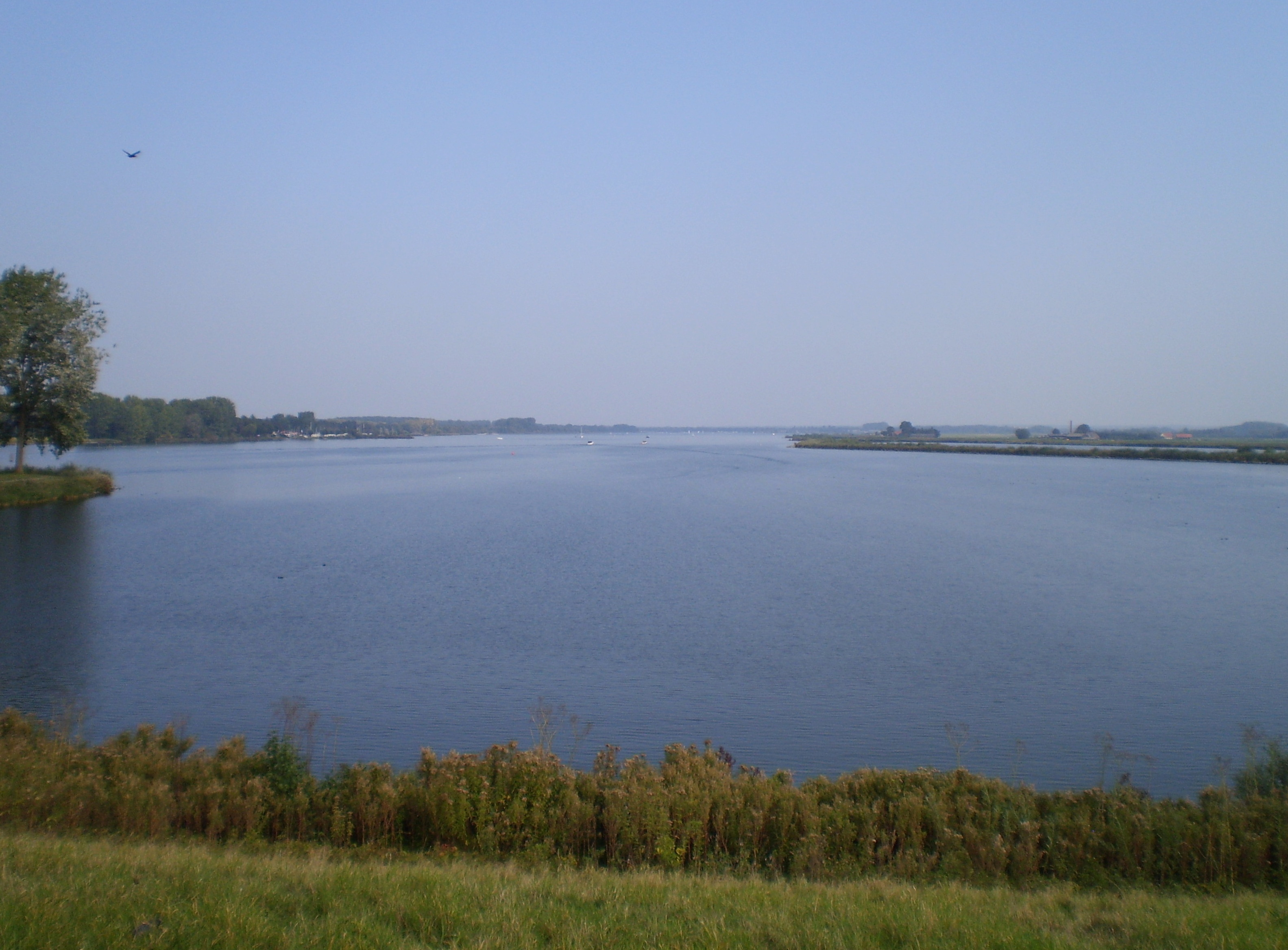 Nuldernau